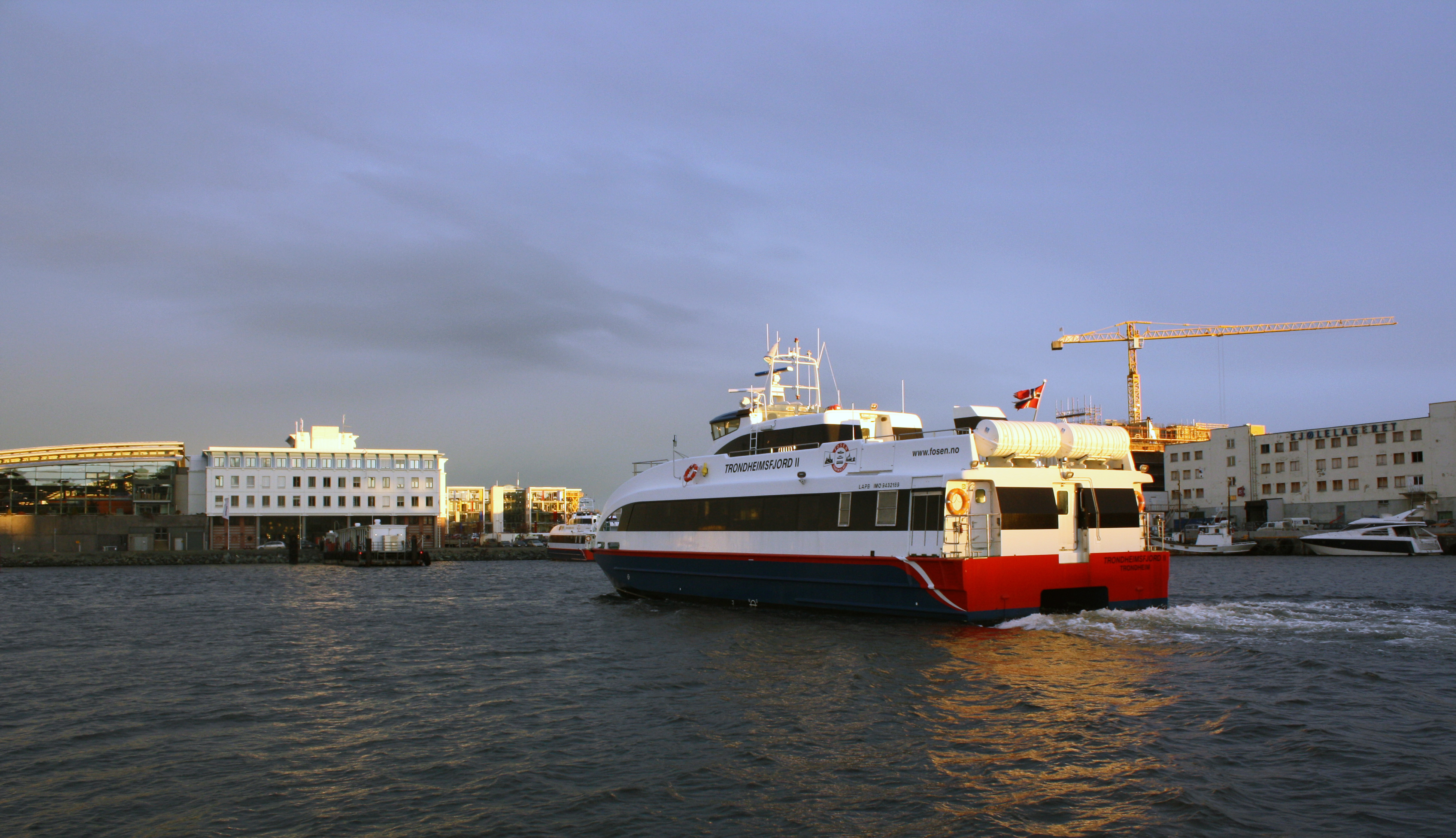 Kystekspressen i form av hurtigbåt Trondheimsfjord II ankommer Trondheim havn og Pirterminalen.